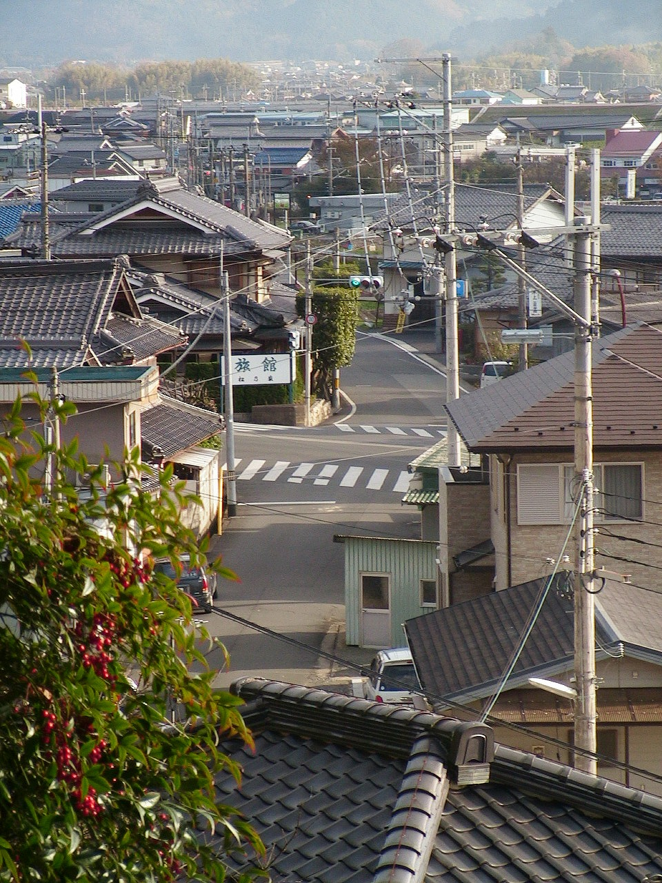 兵庫県春日町の町並み